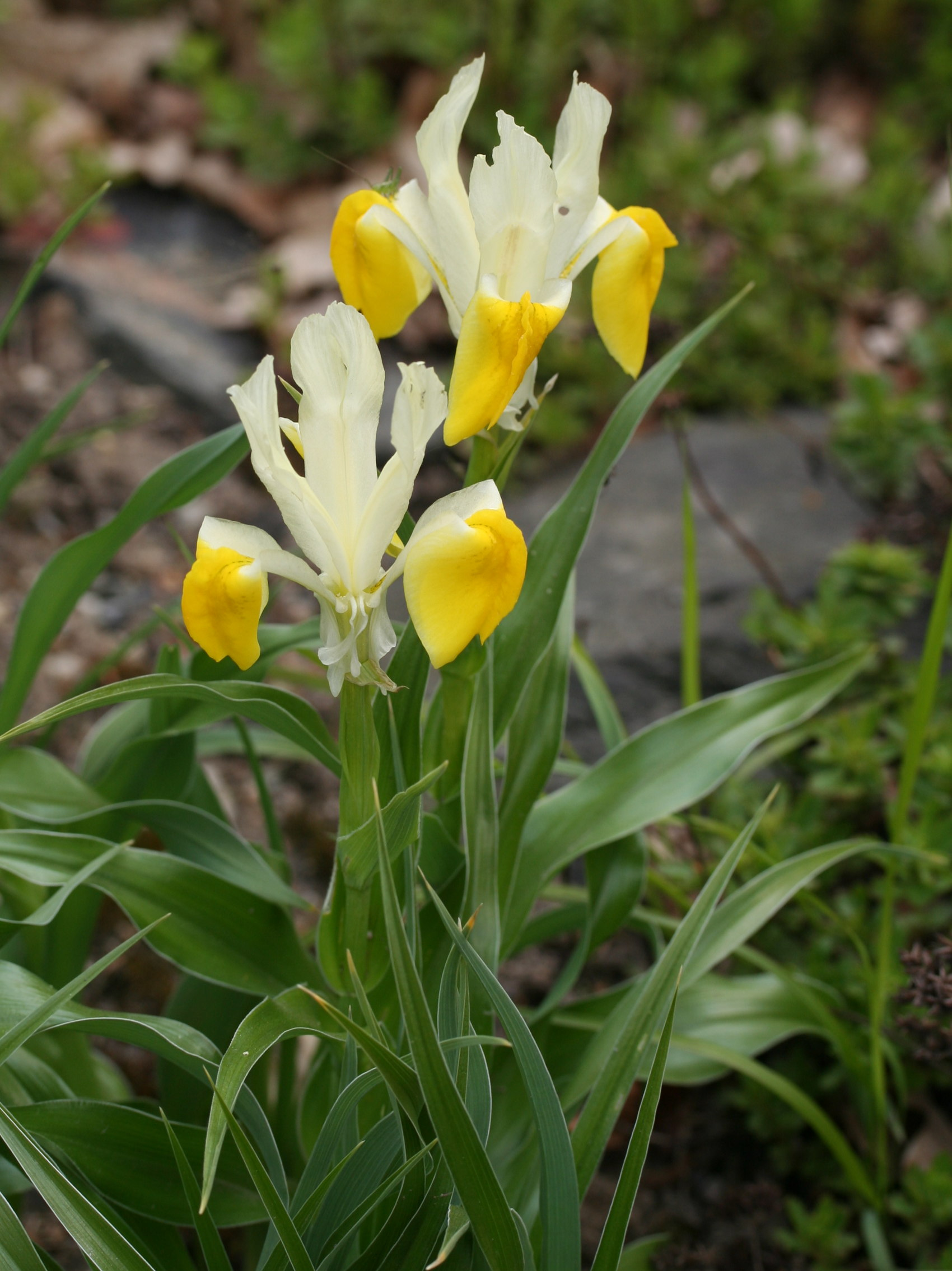 Iris bucharica im Botanischen Garten Dresden